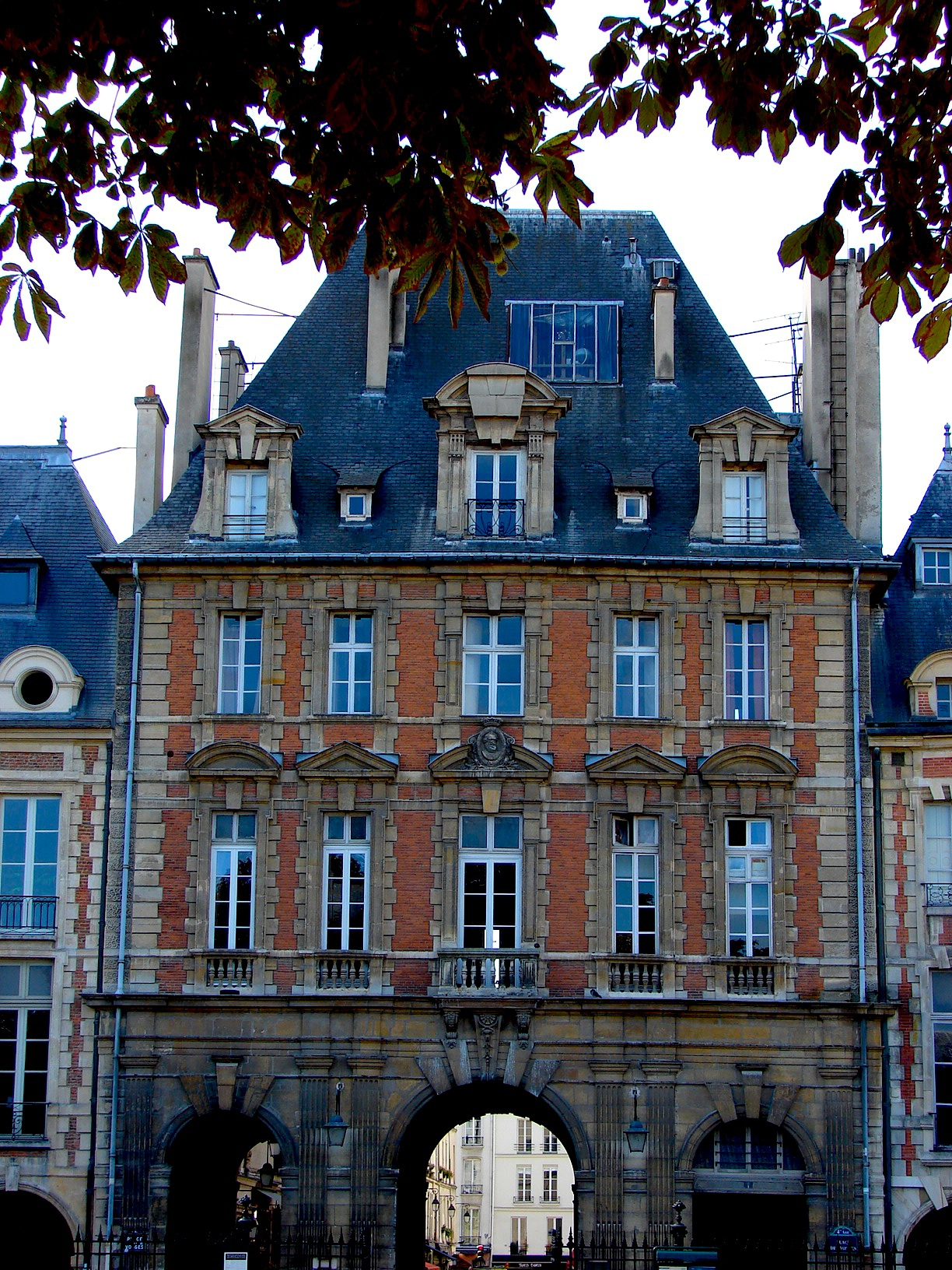 Pavillon du Roi - Place des Vosges - Paris 4 Vue générale de la façade sur la Place des Vosges Le Pavillon du Roi bâti au sud de la place fait face à celui de la Reine. Il ne furent cependant jamais habités par la monarchie. .